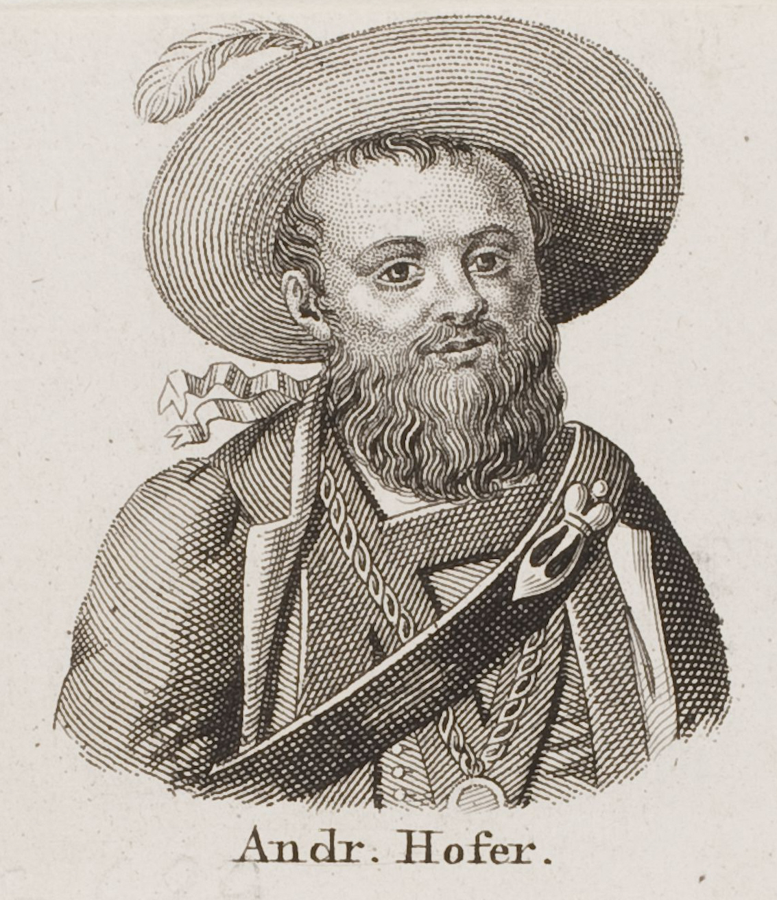 Bildnis Andreas Hofer. Wolfenbüttel, Herzog August Bibliothek, Inv.-Nr. A 9822